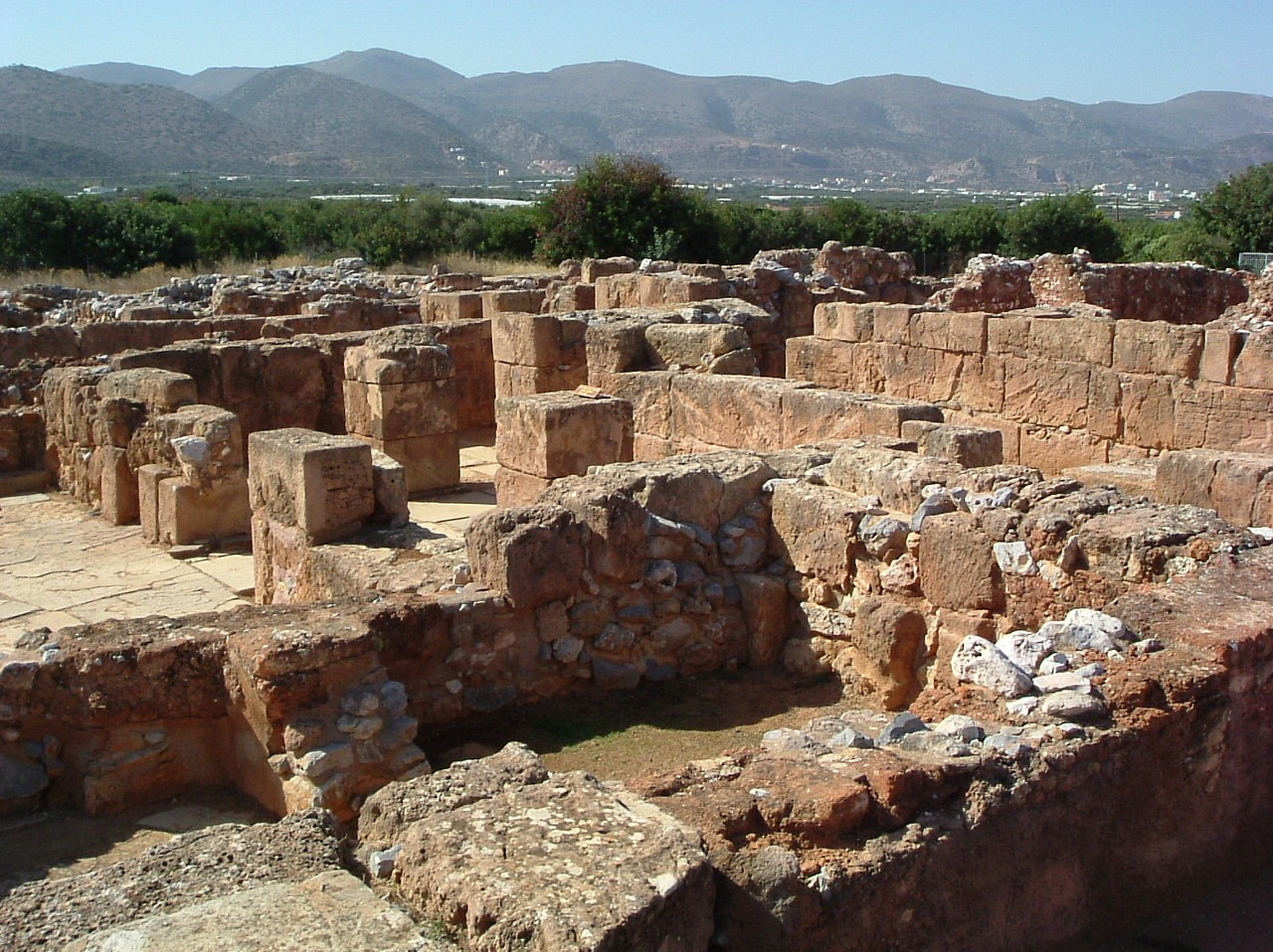 Malia, Crete, Greece